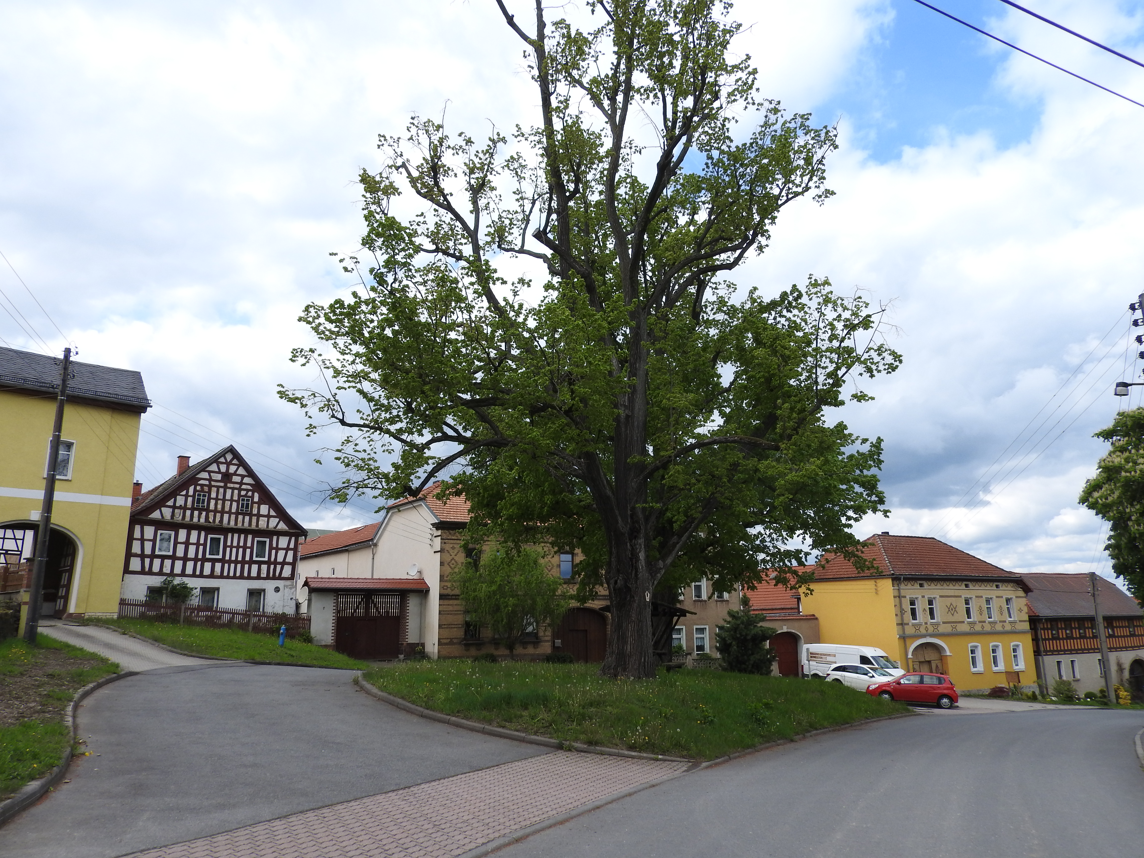 Schmieritz, Thüringen